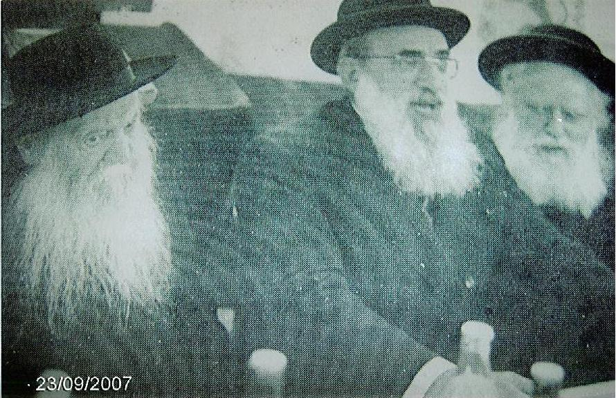 יום ירושלים תשמ"א .הרצי"ה הרב אברהם שפירא והרב שלמה גורן בישיבת מרכז הרב